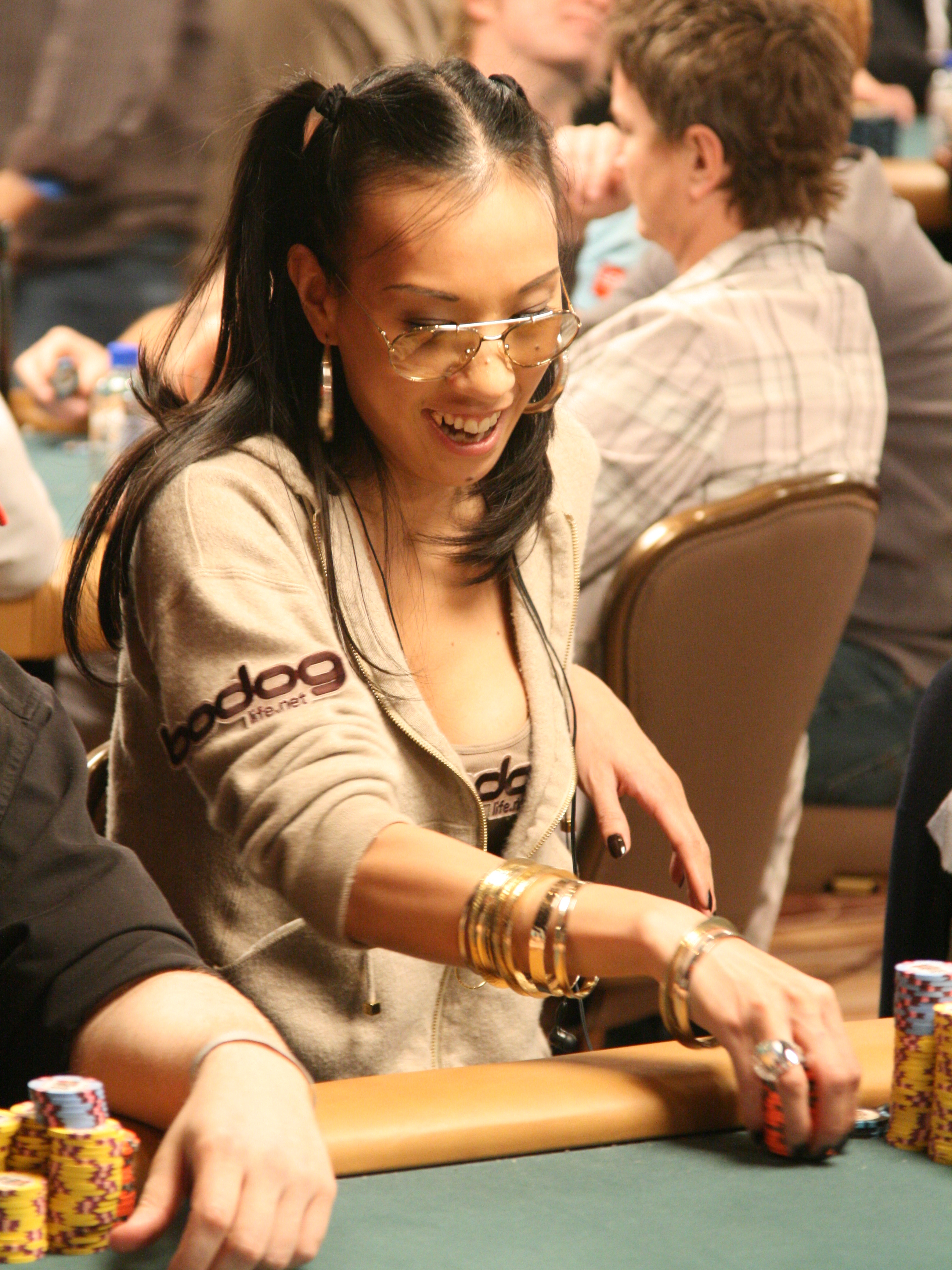 Evelyn Ng bei der World Series of Poker 2008